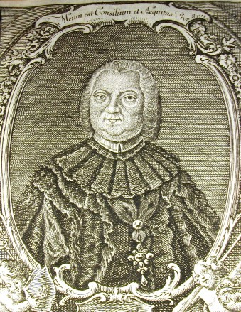 Kupferstich aus Calendarium Parum Capituli Fuldensis, Fulda 1779 (eigenes Foto mit freundl. Genehm. der Bibl. d. Priesterseminars Fulda)